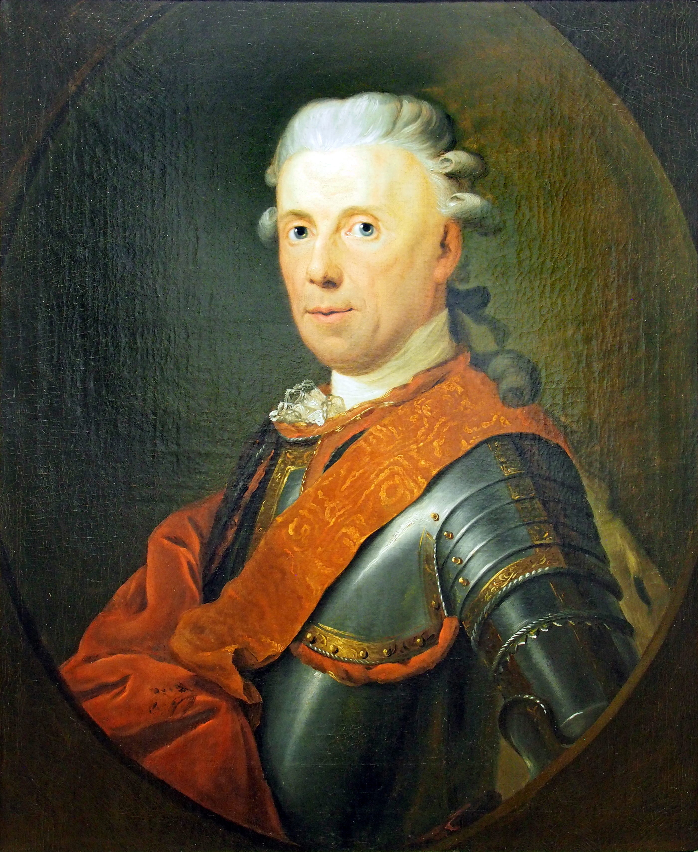 Der jüngere Bruder Friedrichs des Großen, Heerführer im Siebenjährigen Krieg und Diplomat, mit dem auch Goethe verhandelte.